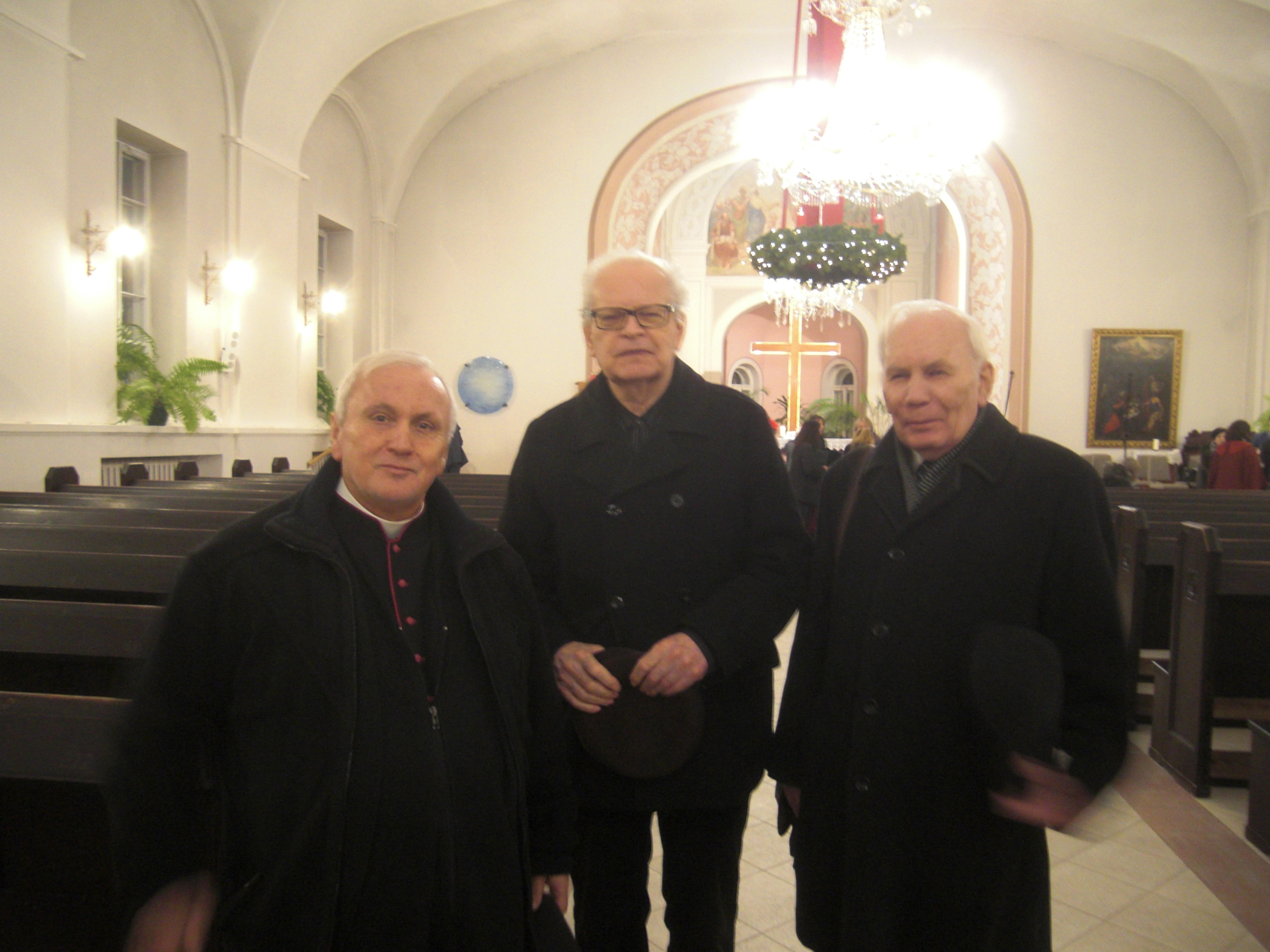 tłumacze ekumenicznego przekładu NT: Banak, Preis, Lipiński